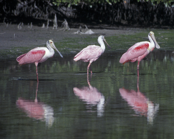 Roseate spoonbills